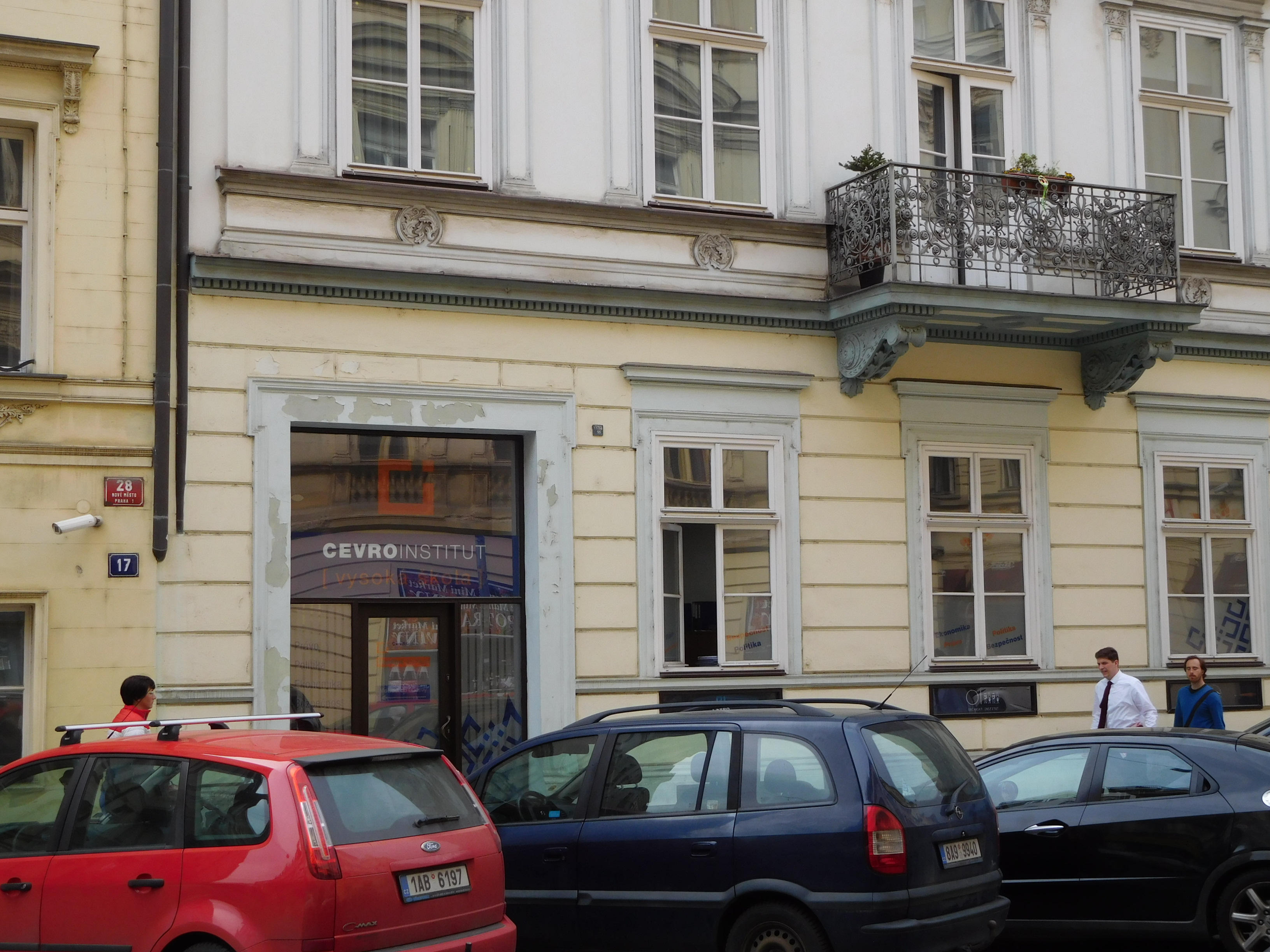 Praha - Nové Město, Jungmannova 19, CEVRO Institut